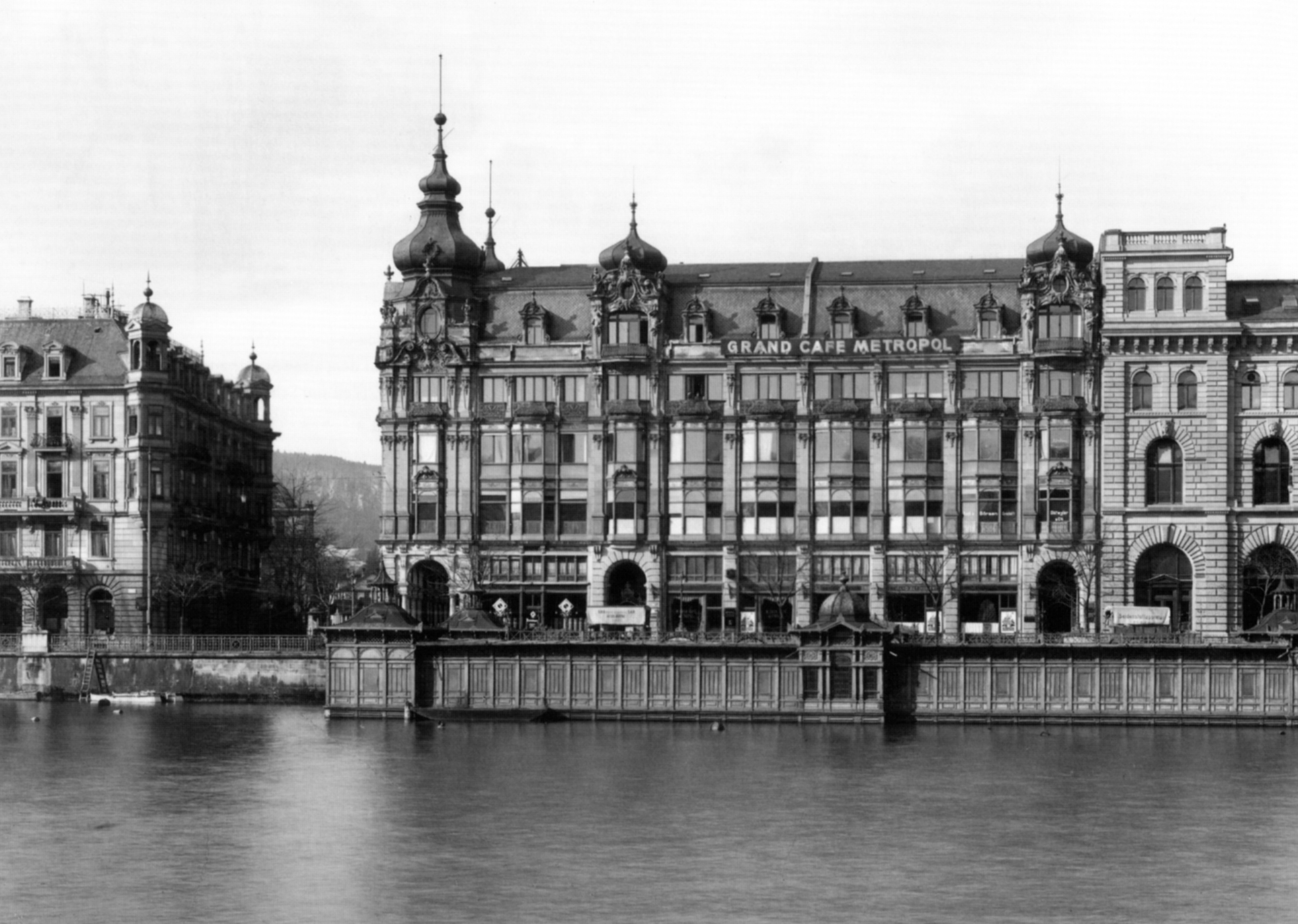 Das Haus "Metropol" in Zürich am Stadthausquai um 1914. Das Gebäude wurde zwischen 1892 und 1894 nach den Plänen von Heinrich Ernst im Stil des Neobarock erbaut.